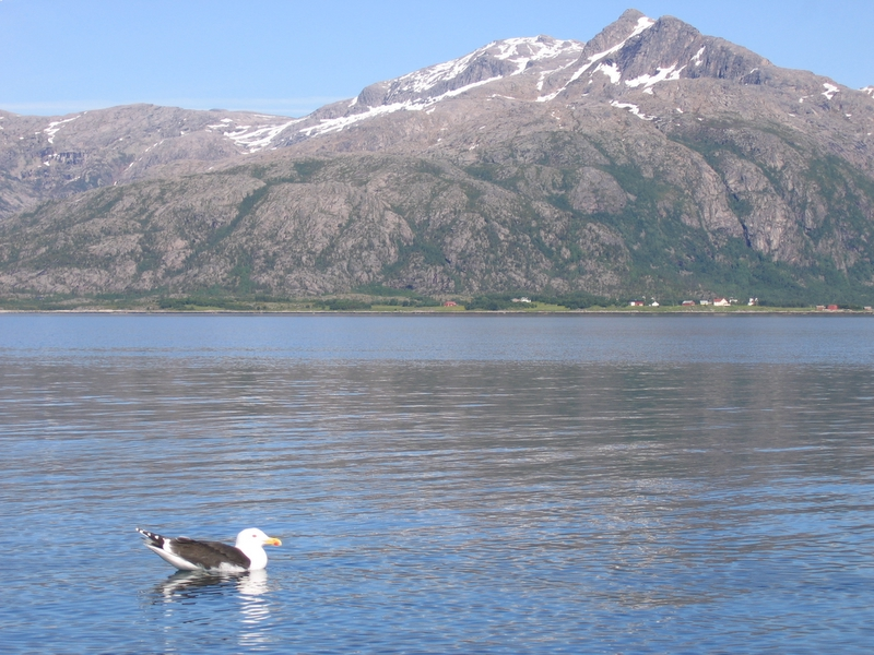 Europavei 10 / Riksvei 85: Motiv fra Tjeldsund, Nordland. Kjærstad, Tjeldøy i bakgrunnen.